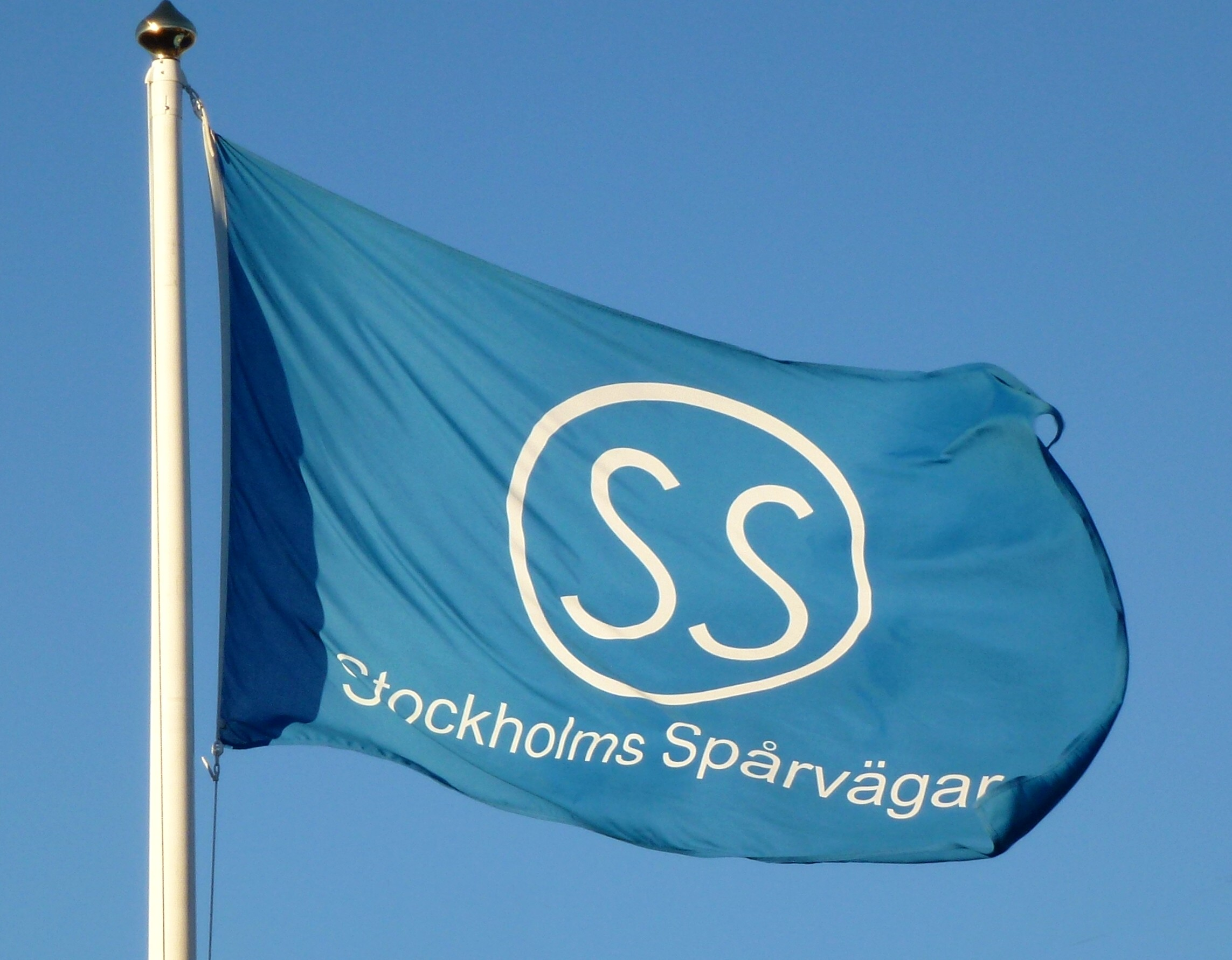 Strockholms Spårvägar flagga